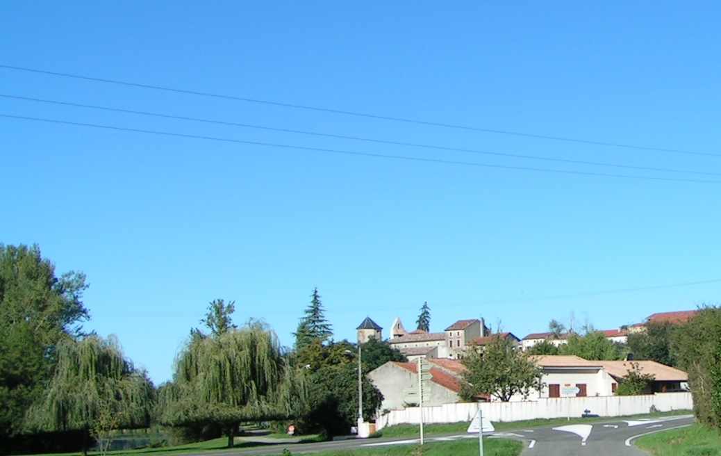 Couladère Image presonnelle Catégorie: Image GFDL